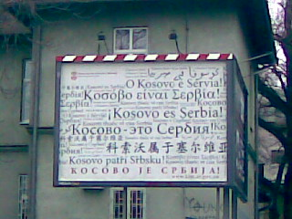 Jedan od beogradskih bilborda u drugoj fazi kampanje "Kosovo je Srbija". 27. mart 2008 Licensing